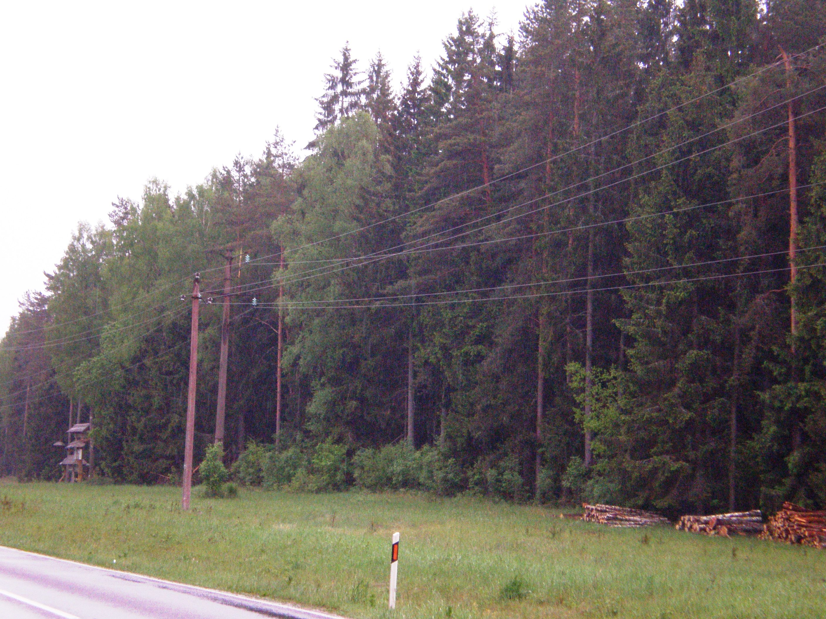 Karšuvos giria, Tauragės raj.